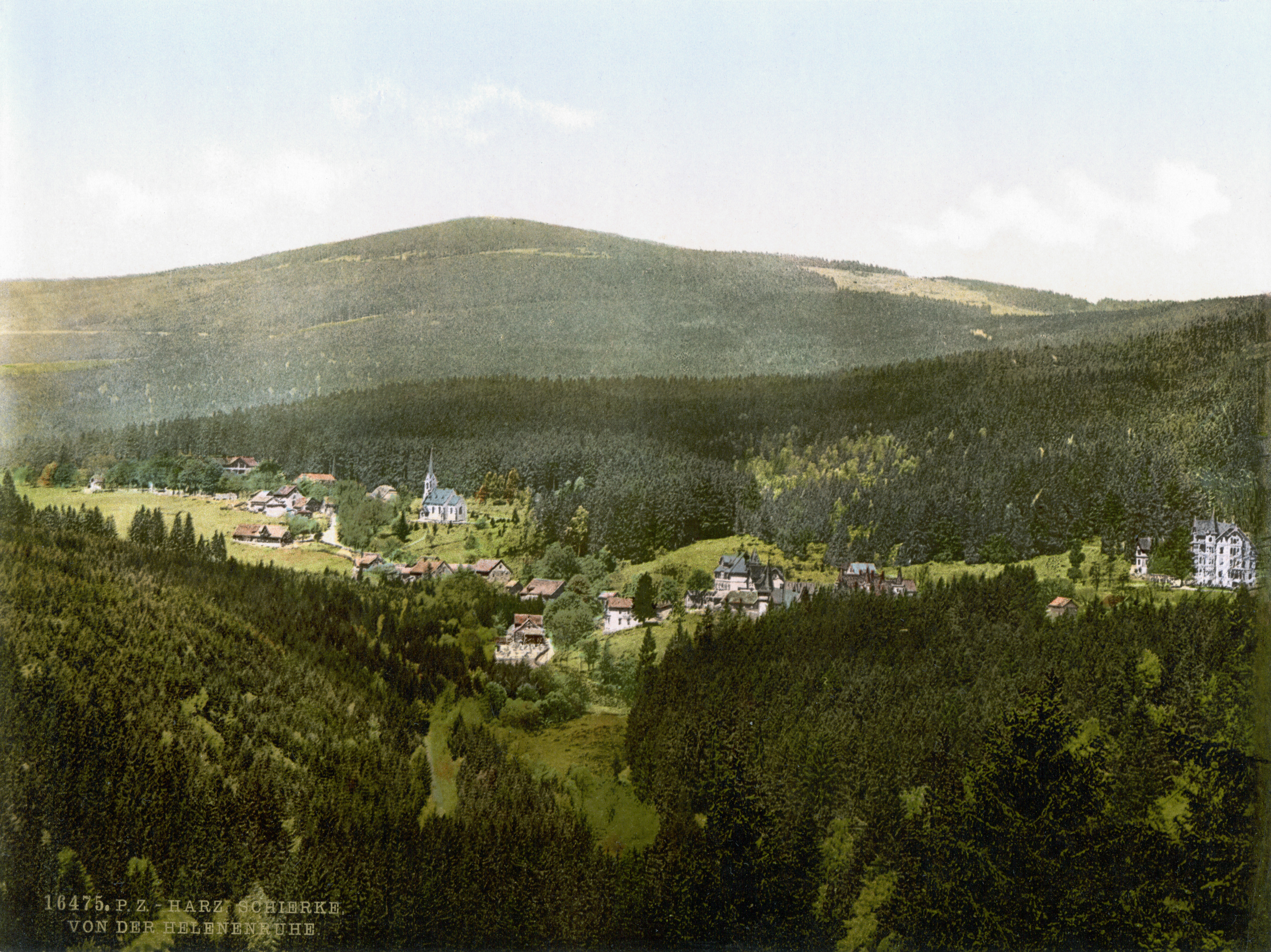 Schierke